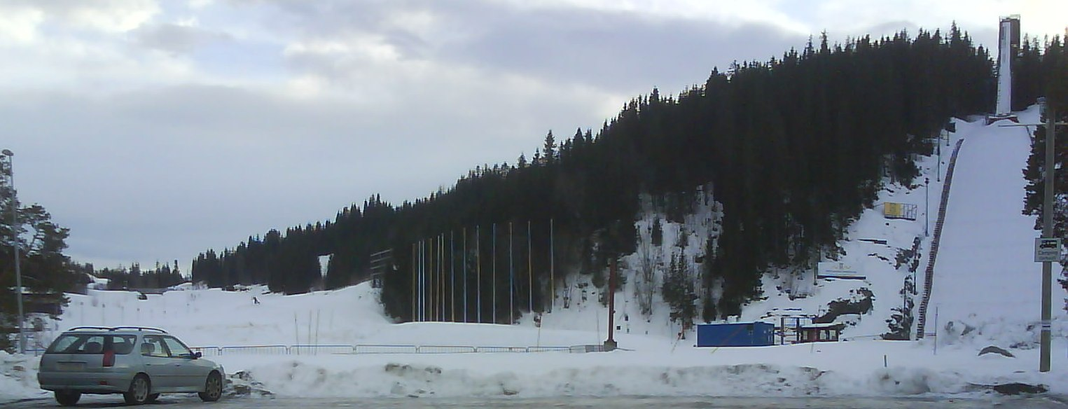 Granåsen Ski Centre in Trondheim, Norway